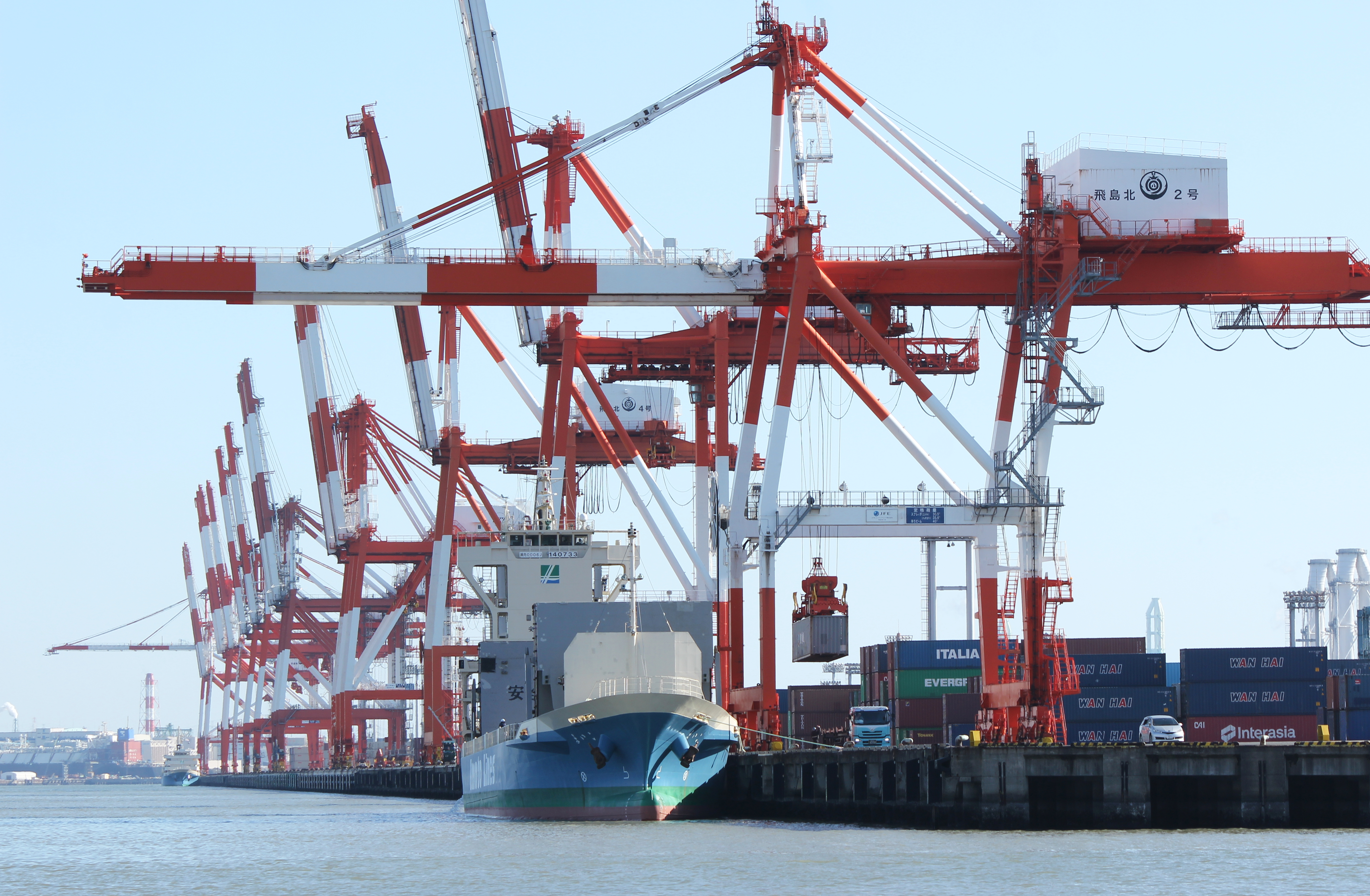 名古屋港飛島ふ頭のコンテナターミナル。画像は井本商船のセミコンテナ船「まいこ」。